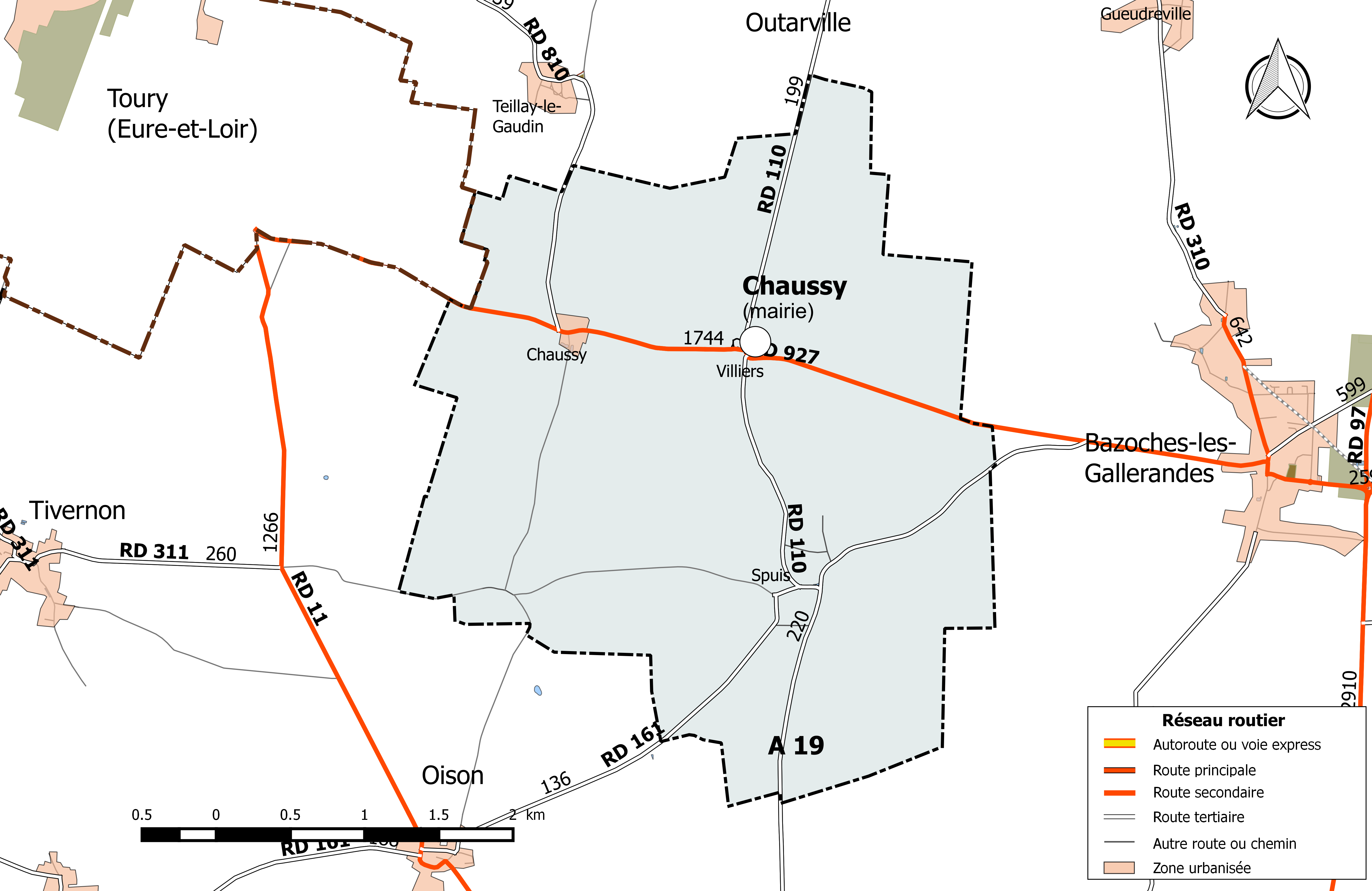 Carte du réseau routier de la commune de Chaussy (Loiret).